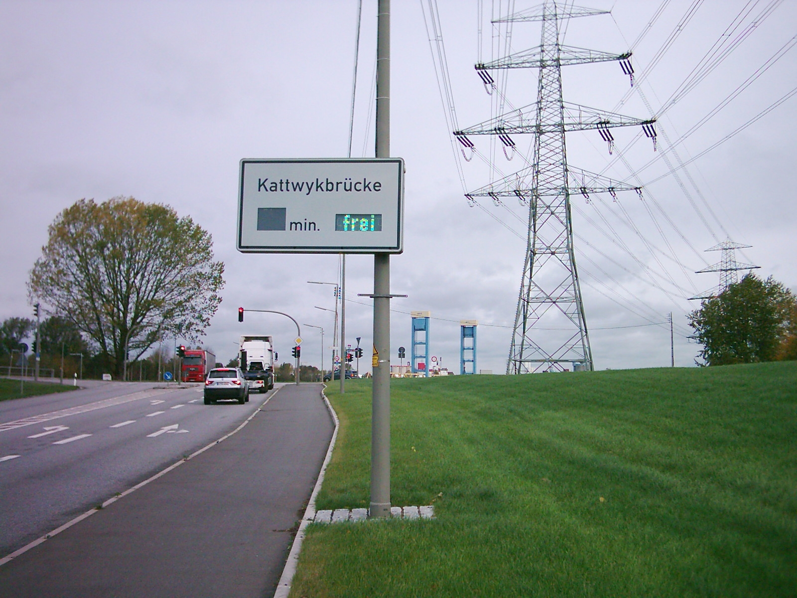 Statustafel (frei/gesperrt) vor der Kattwykbrücke über die Süderelbe in Hamburg-Moorburg.